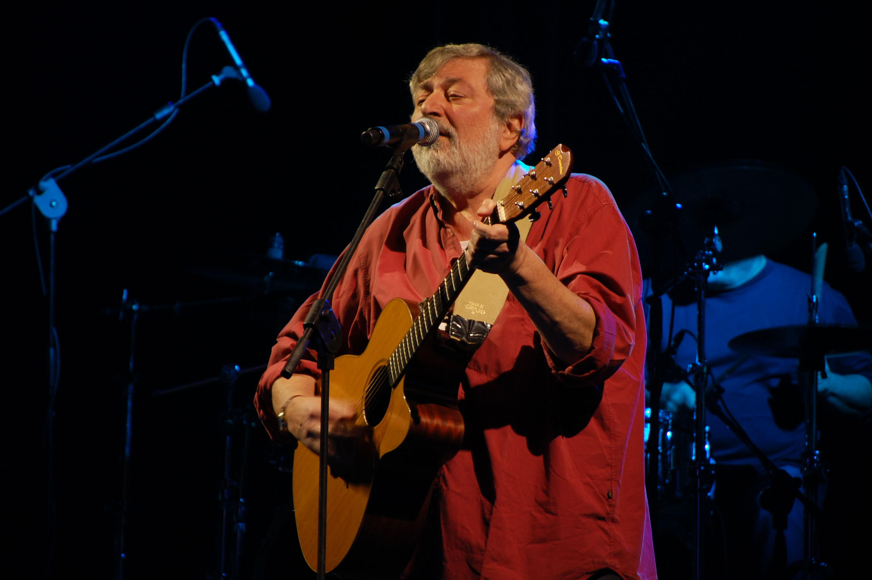 Francesco Guccini in concerto a Piacenza il 27 novembre 2009